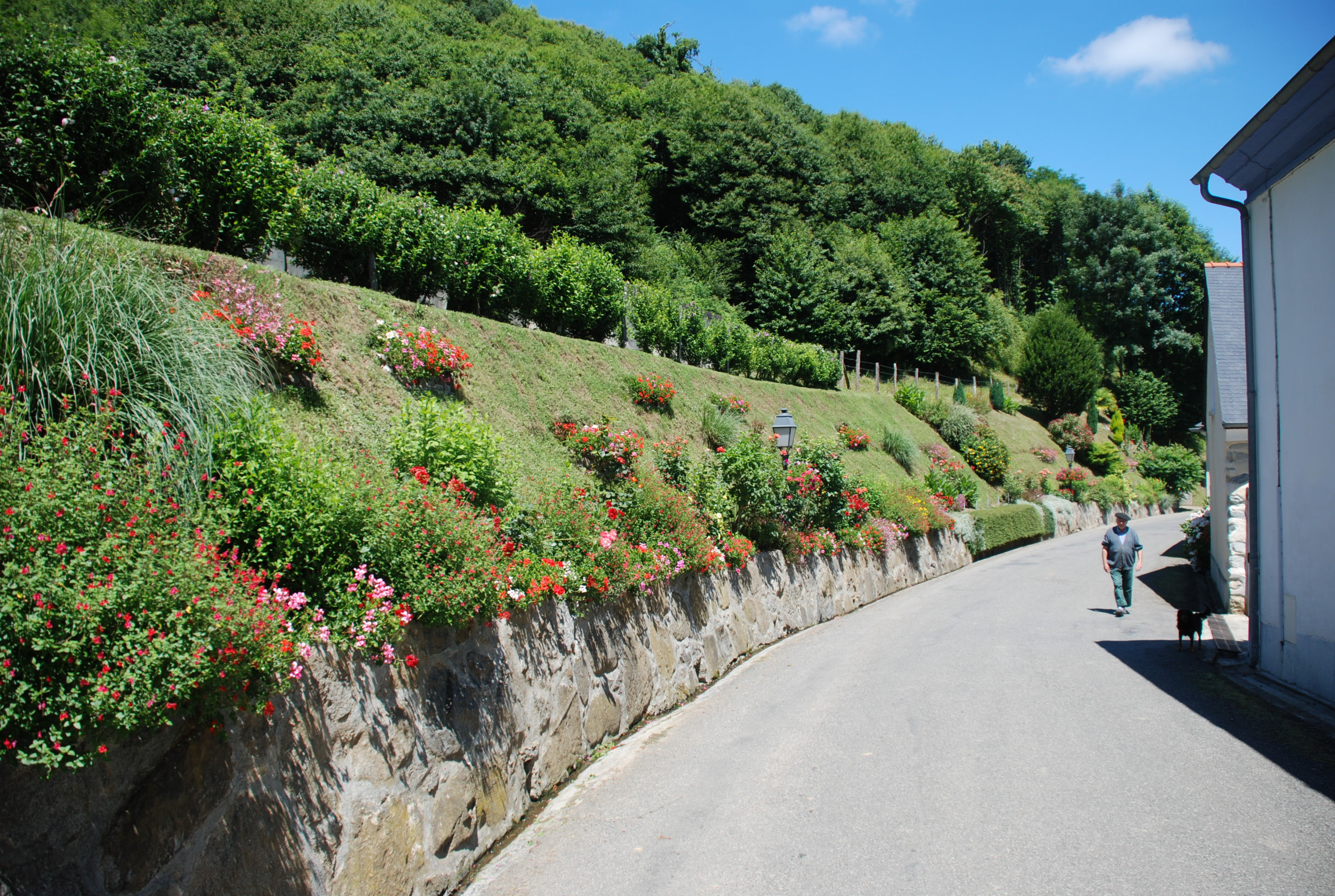 Talus fleuri le long de la voie départementale traversant le village de Bourréac face à l'entrée de la maison Arcos